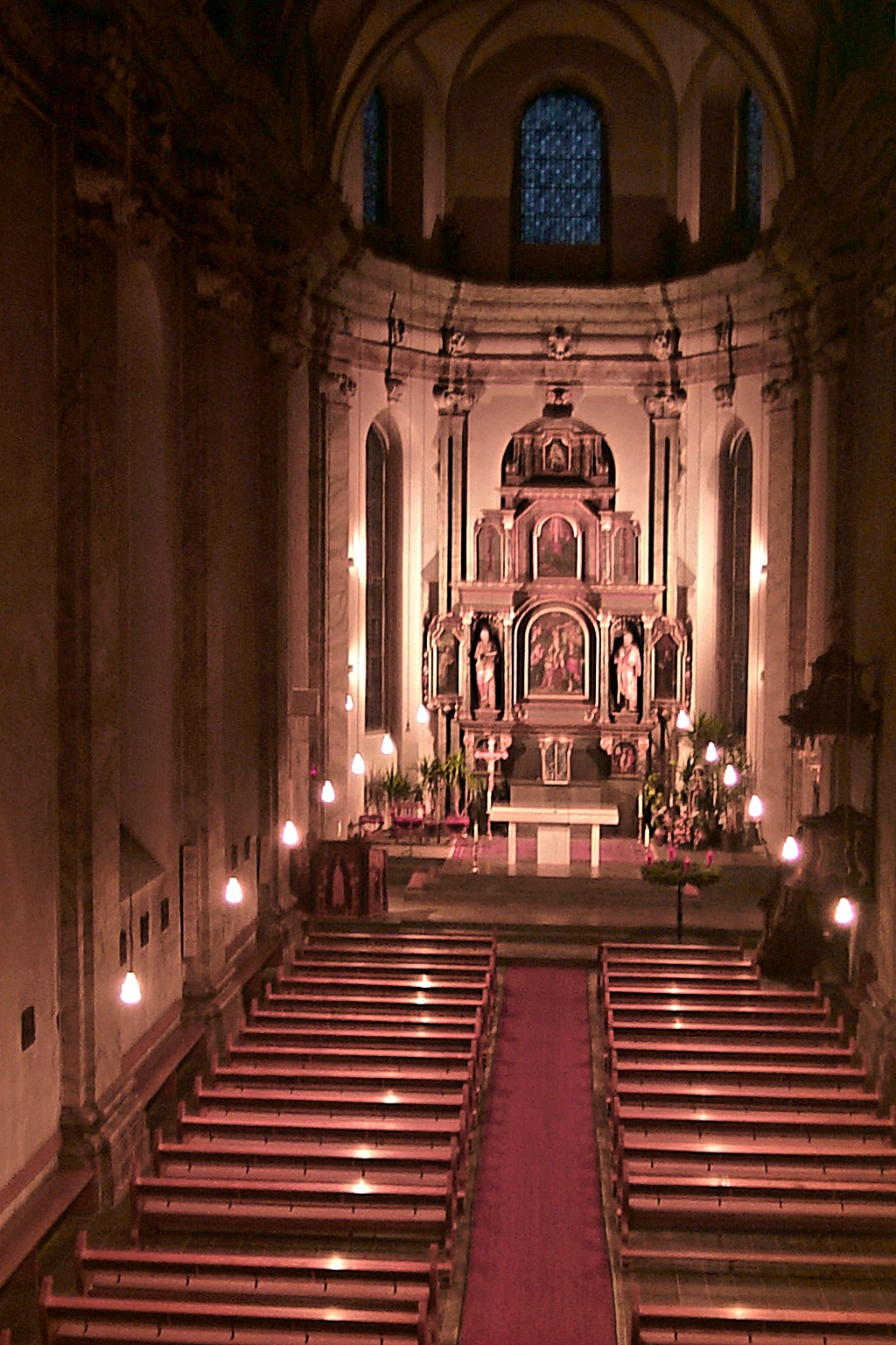 Ehemalige Klosterkirche Konz-Karthaus, heute St. Johann von Innen